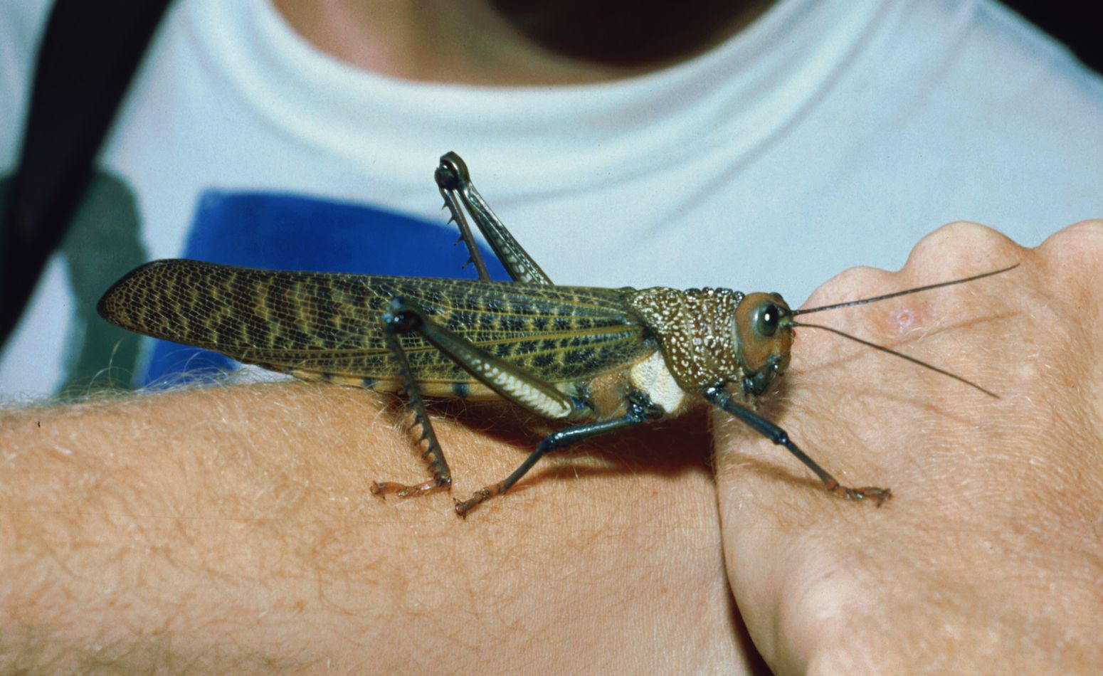 Tropidacris cristata, Romaleidae – Costa Rica: Prov. Guanacaste, Río Corobicí, NW Cañas